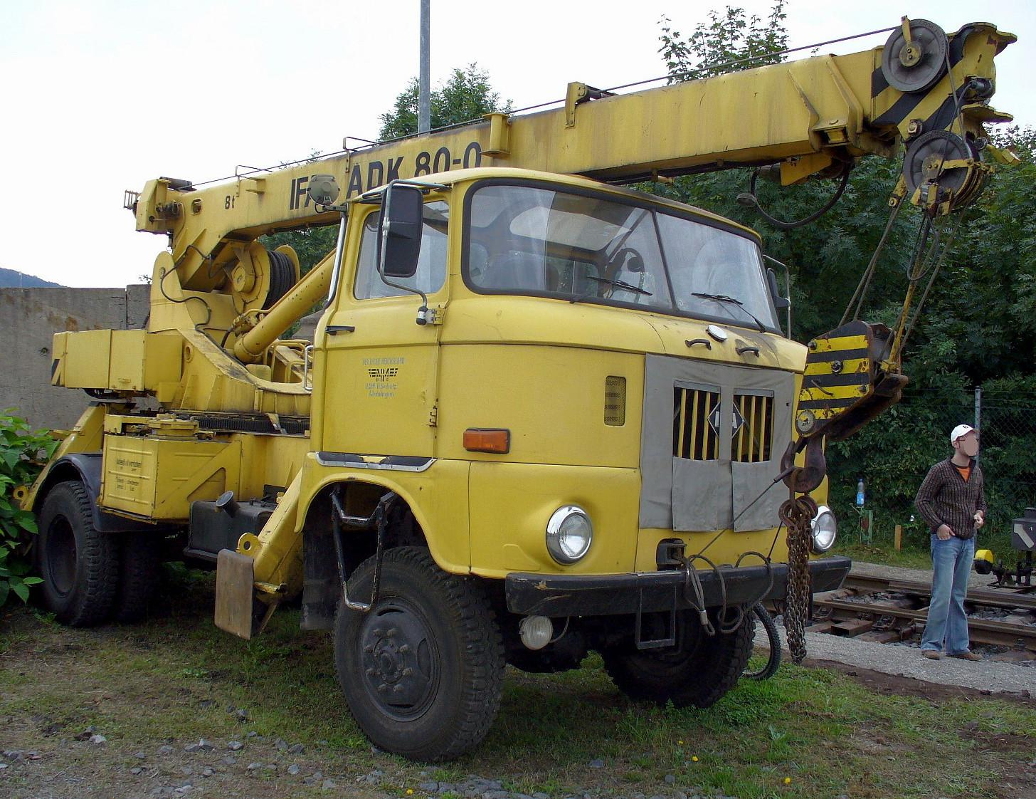 ADK 80-0 (Autodrehkran, 80 Dezitonnen Hebelast) vom VEB Maschinenbau „Karl Marx“ Babelsberg auf W50-Basis